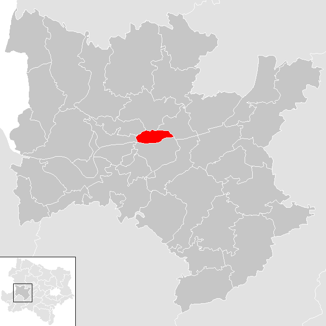 Bezirk Melk